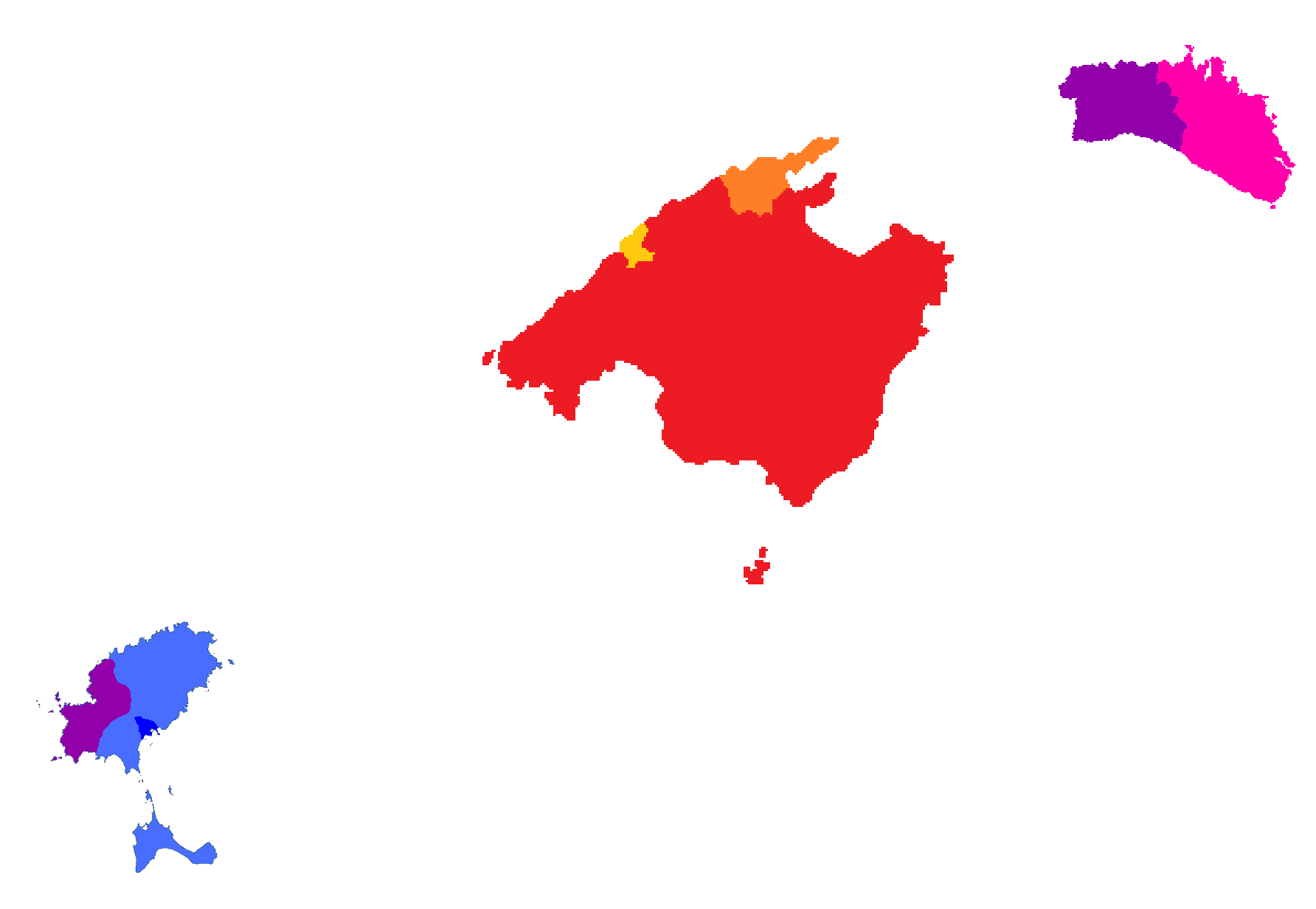 Variedades del catalán en las Islas Baleares.